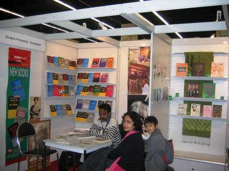 ২০০৭,ফ্রাঙ্কফুর্ট বইমেলায় শ্রাবণ প্রকাশনীর স্টল